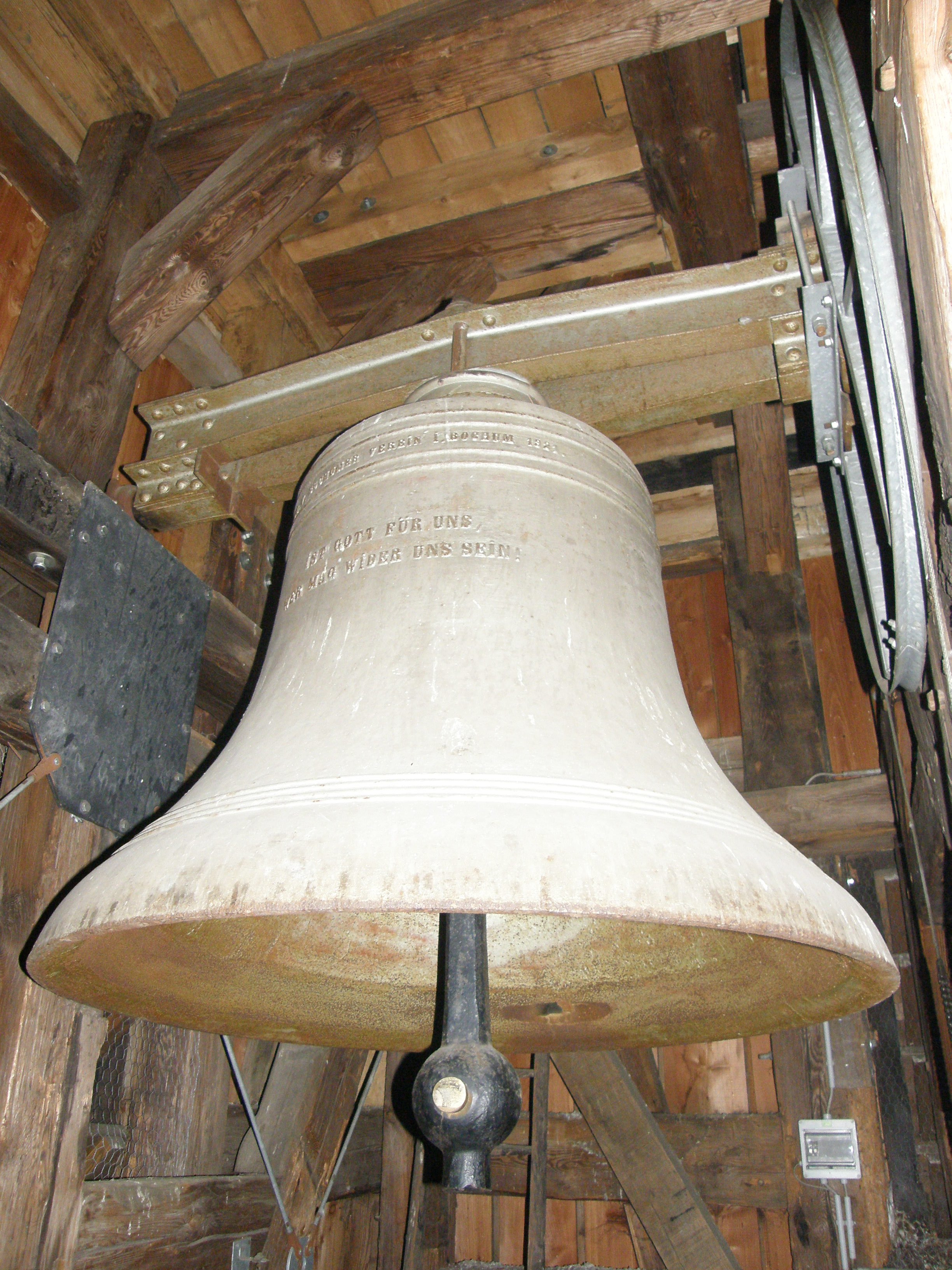 Falkenhagener Dorfkirche, Glocke